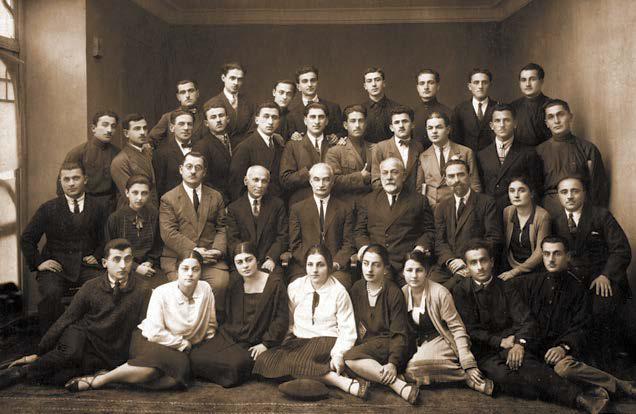 მეორე რიგში სხედან: მარცხნიდან მესამე - იურიდიულ მეცნიერებათა დოქტორი, პროფესორი იროდიონ სურგულაძე, მეოთხე - ლექტორი გრიგოლ რცხილაძე, მეხუთე - ისტორიის მეცნიერებათა დოქტორი, პროფესორი, აკადემიკოსი, თბილისის სახელმწიფო უნივერსიტეტის ერთ-ერთი დამფუძნებელი ივანე ჯავახიშვილი, მეექვსე - ცნობილი ადვოკატი, პოლიტიკური დამცველი, პროფესორი, სამოქალაქო სამართლის კათედრის გამგე, საქართველოში იურიდიული განათლების ფუძემდებელი ლუარსაბ ანდრონიკაშვილი გადაღებულია 1929 წელს, ქ. თბილისი